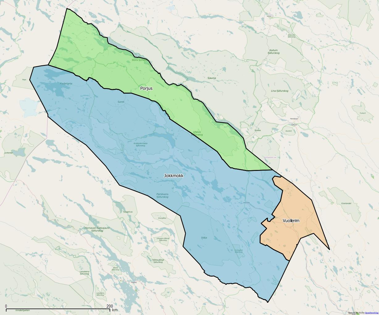 Distriktsindelningen i Jokkmokks kommun World file: 593.72117035760231829 0 0 -593.72117035760231829 1734310.53441300755366683 10434823.54809349402785301